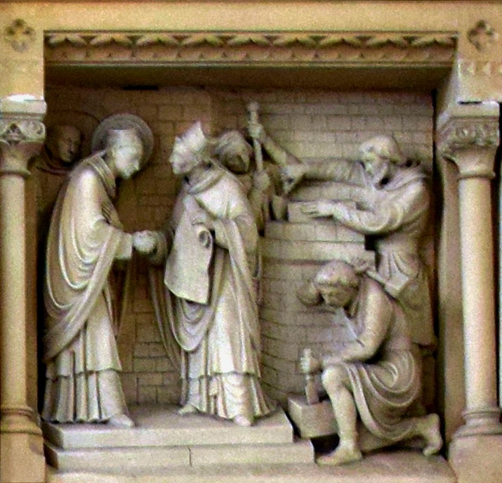 Collégiale Saint-Ursmer (Lobbes) - Intérieur